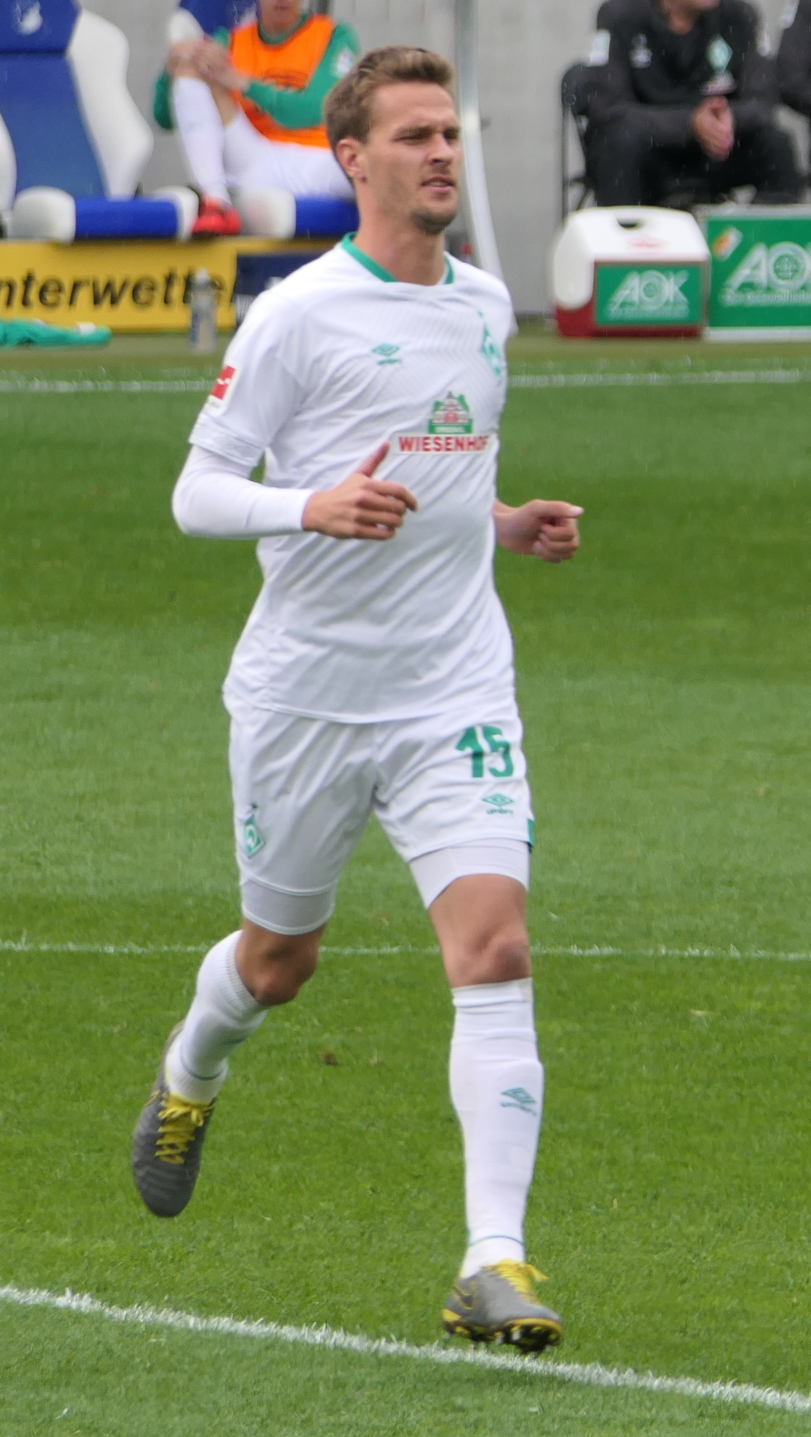 Der Fussballprofi Sebastian Langkamp im Trikot vom SV Werder Bremen beim Auswärtsspiel gegen die TSG 1899 Hoffenheim am 11.05.2019.